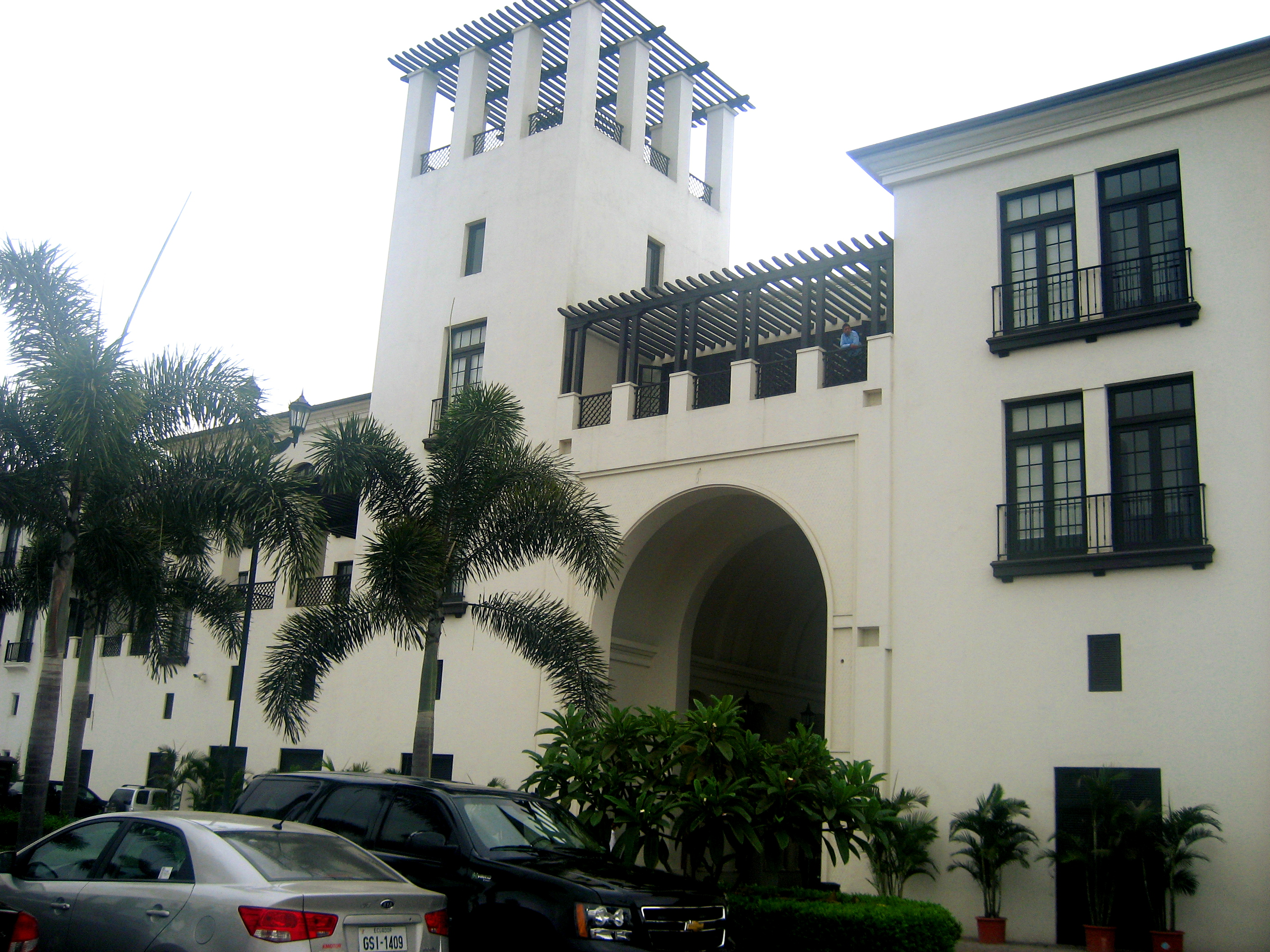 Foto del centro comercial Plaza Lagos Town Center